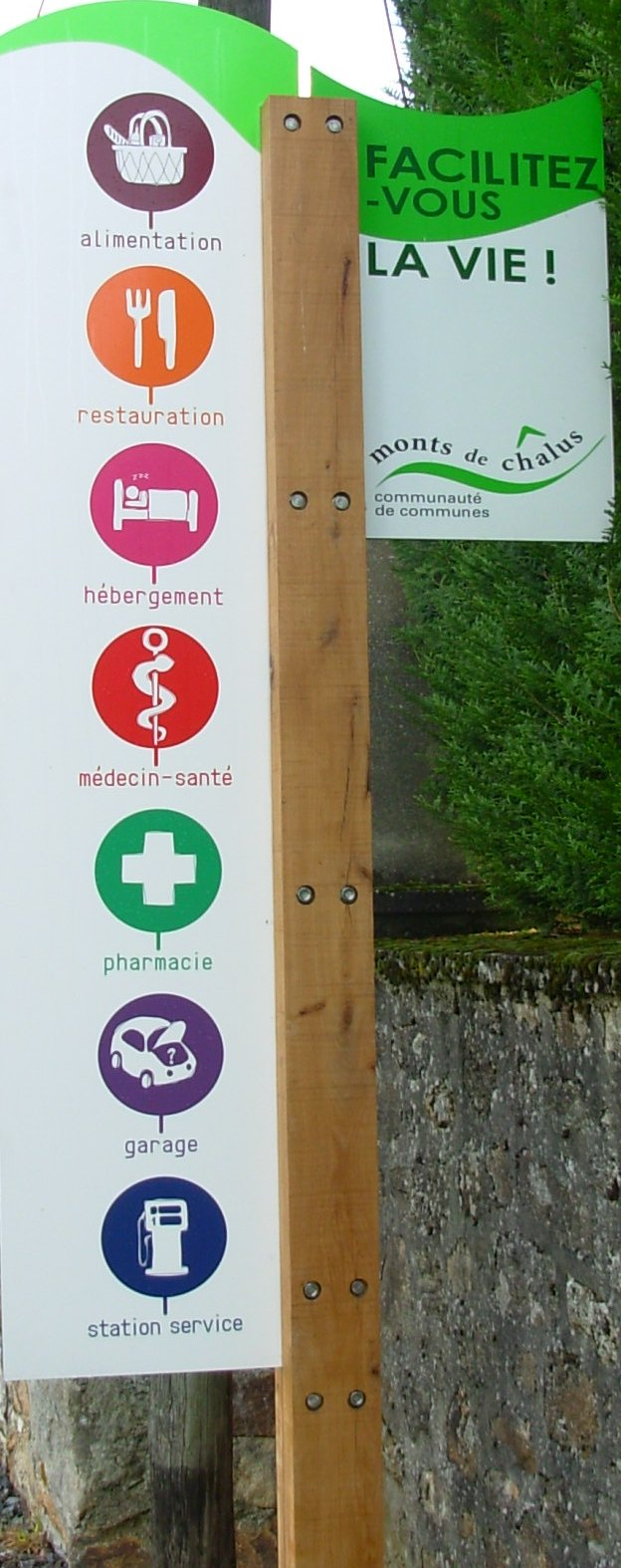 Flavignac, totem d'entrée, commerces et services